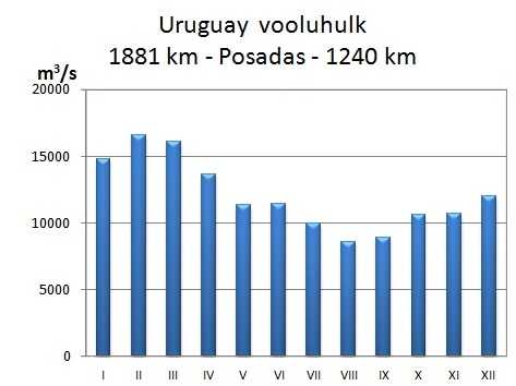 Uruguay hüdrograaf Posadases